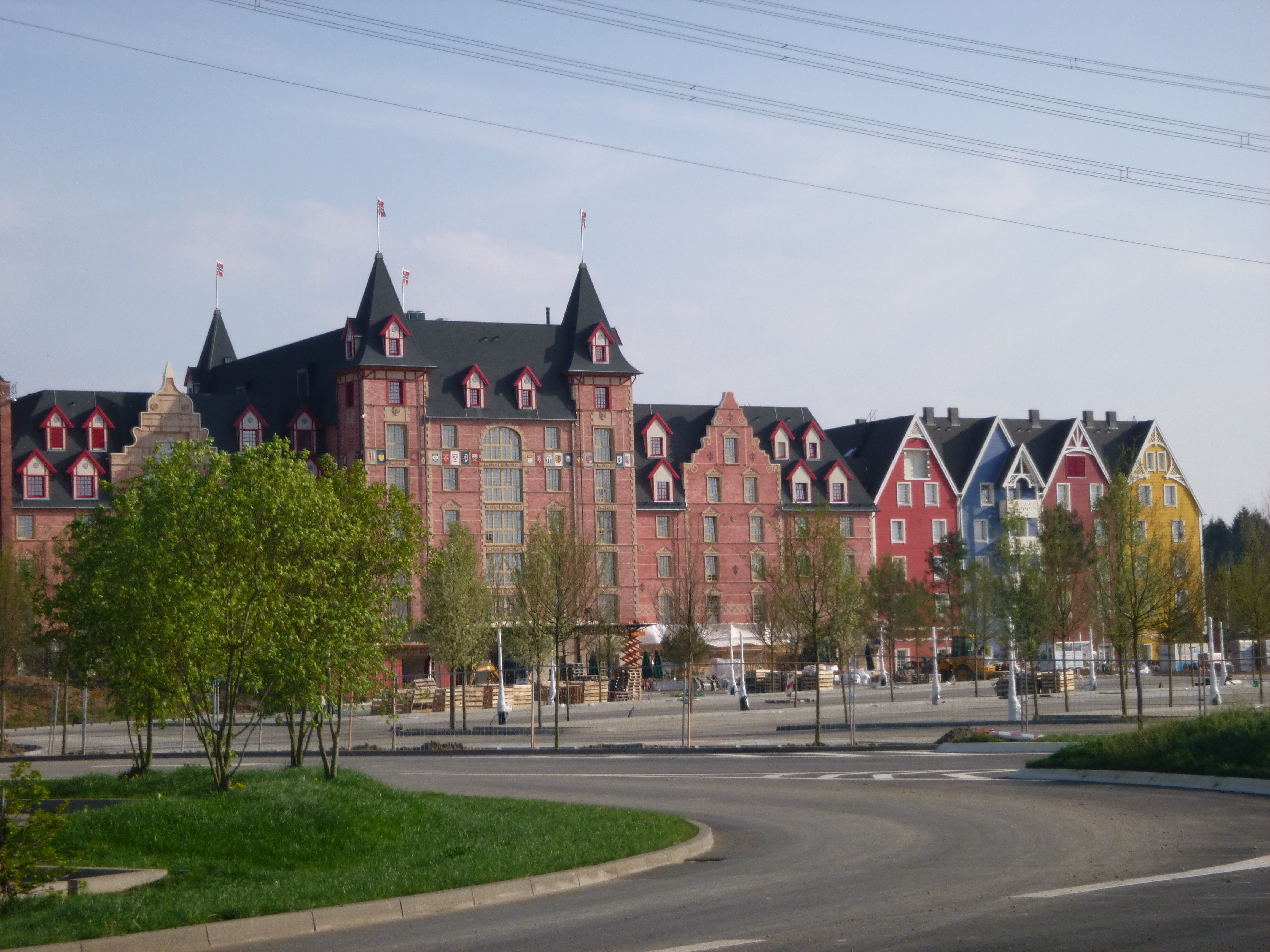 L'hôtel "Krønasår The Museum-Hotel" à Europa-Park